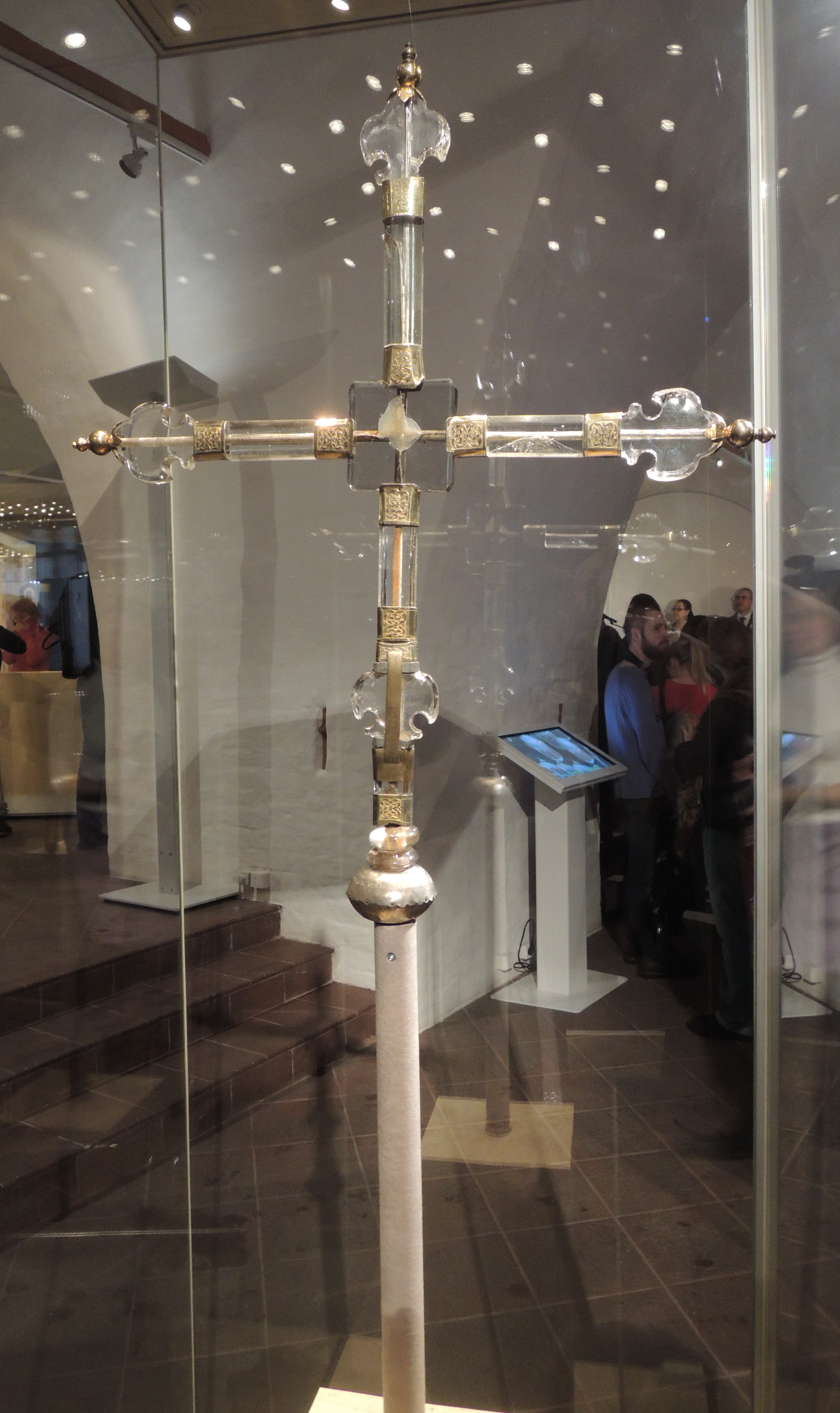 В Музеях Московского Кремля находится крест выносной «Корсунский» (Западная Европа, XV в. (?), серебряные обкладки — Россия, конец XVI — нач. XVII в.), выполненный из горного хрусталя, серебра и резного дерева.